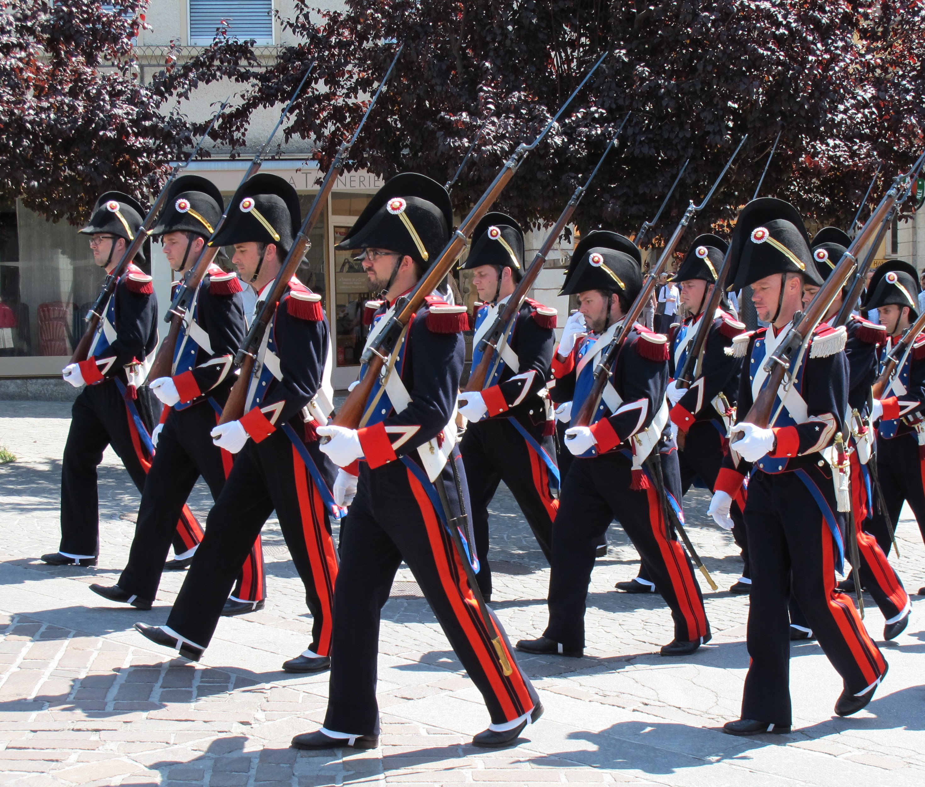 Gendarmes valaisans, procession de la Fête-Dieu, Sion 19 juin 2014